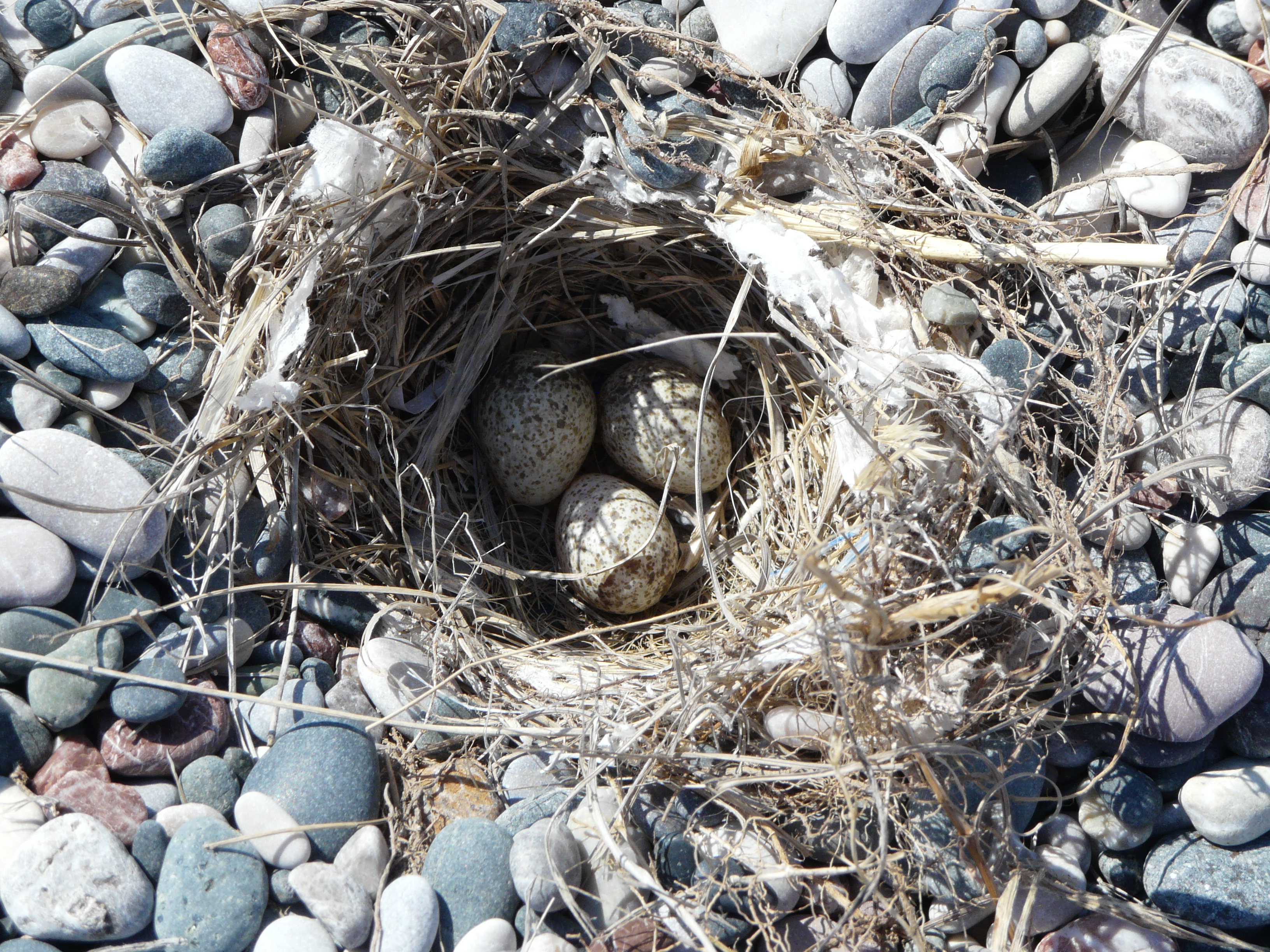 Rhodes